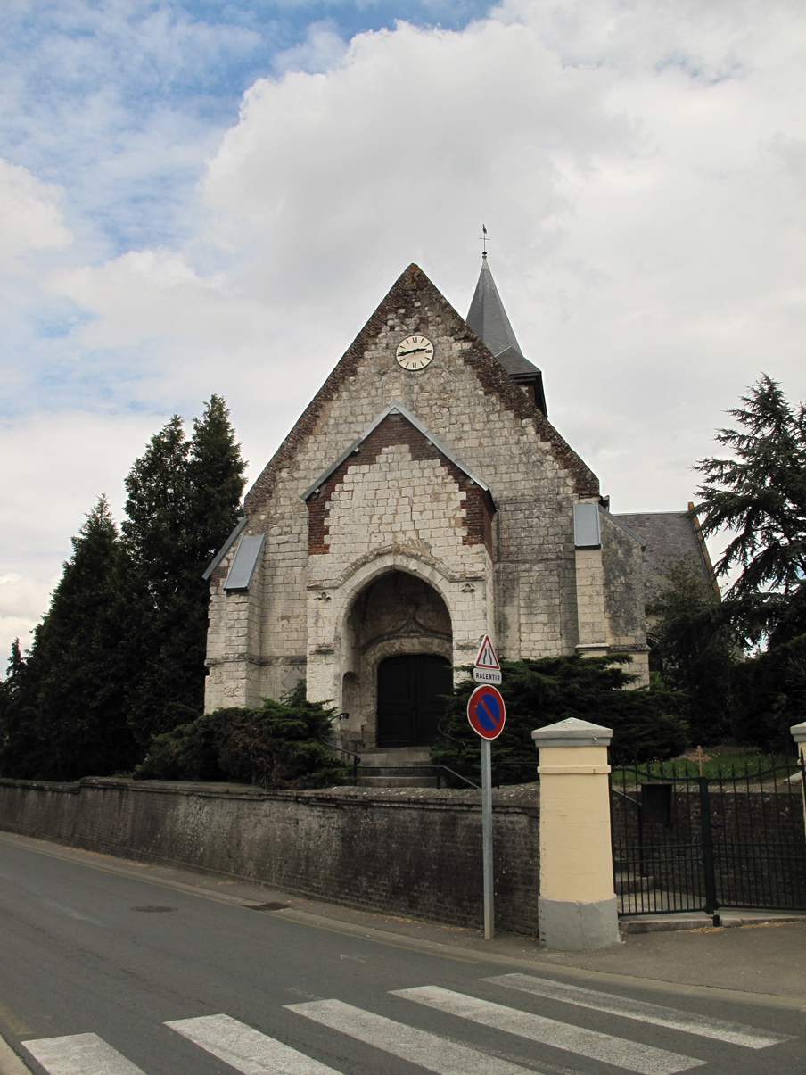 Buire-le-Sec église